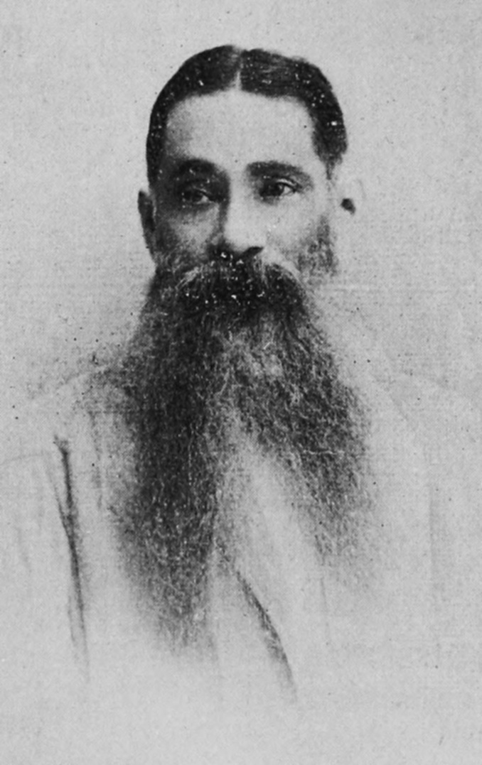 W.C.Bonnerjee